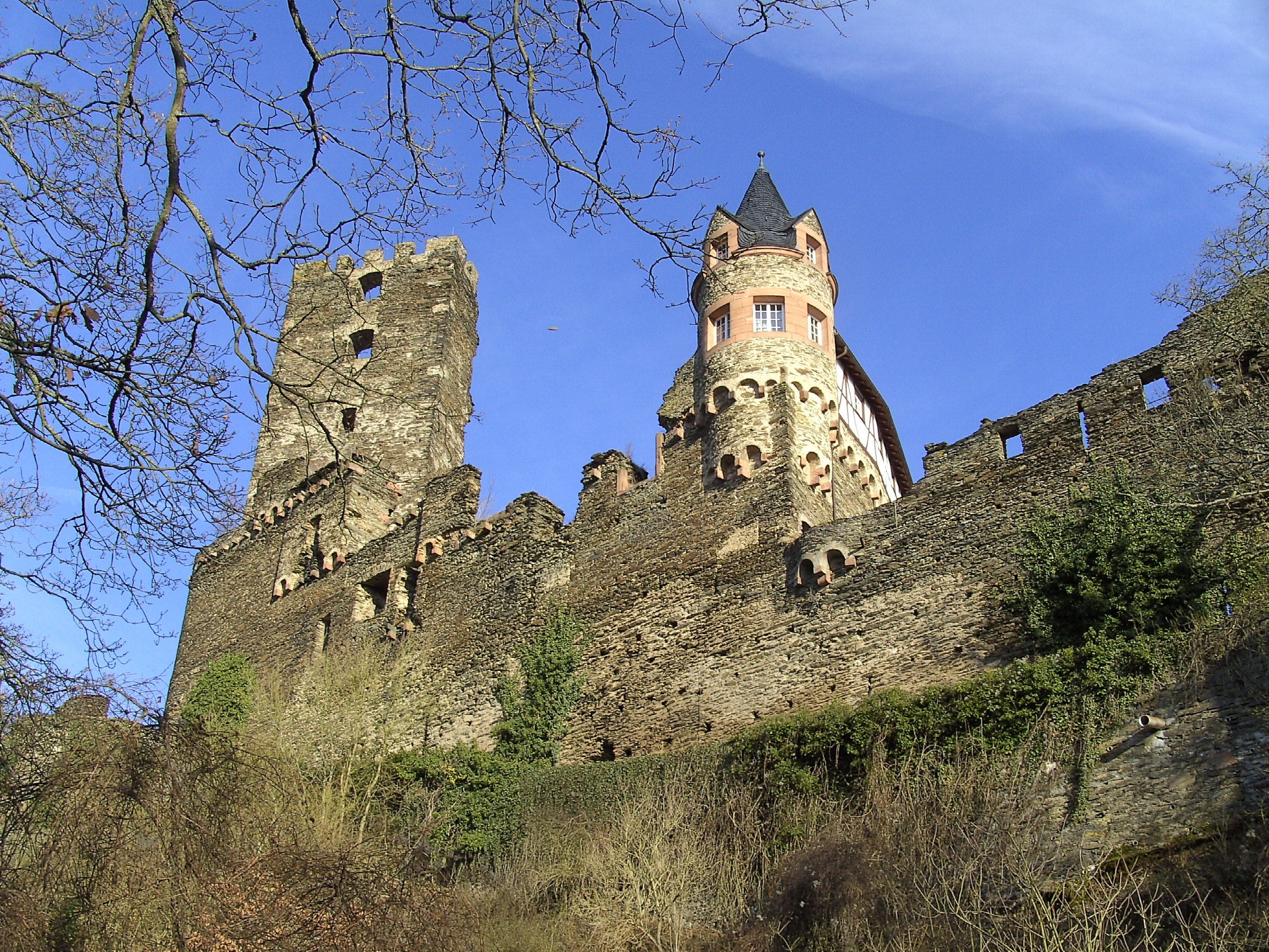 Burg Sauerburg über Sauerthal Nähe Lorch Am Rhein